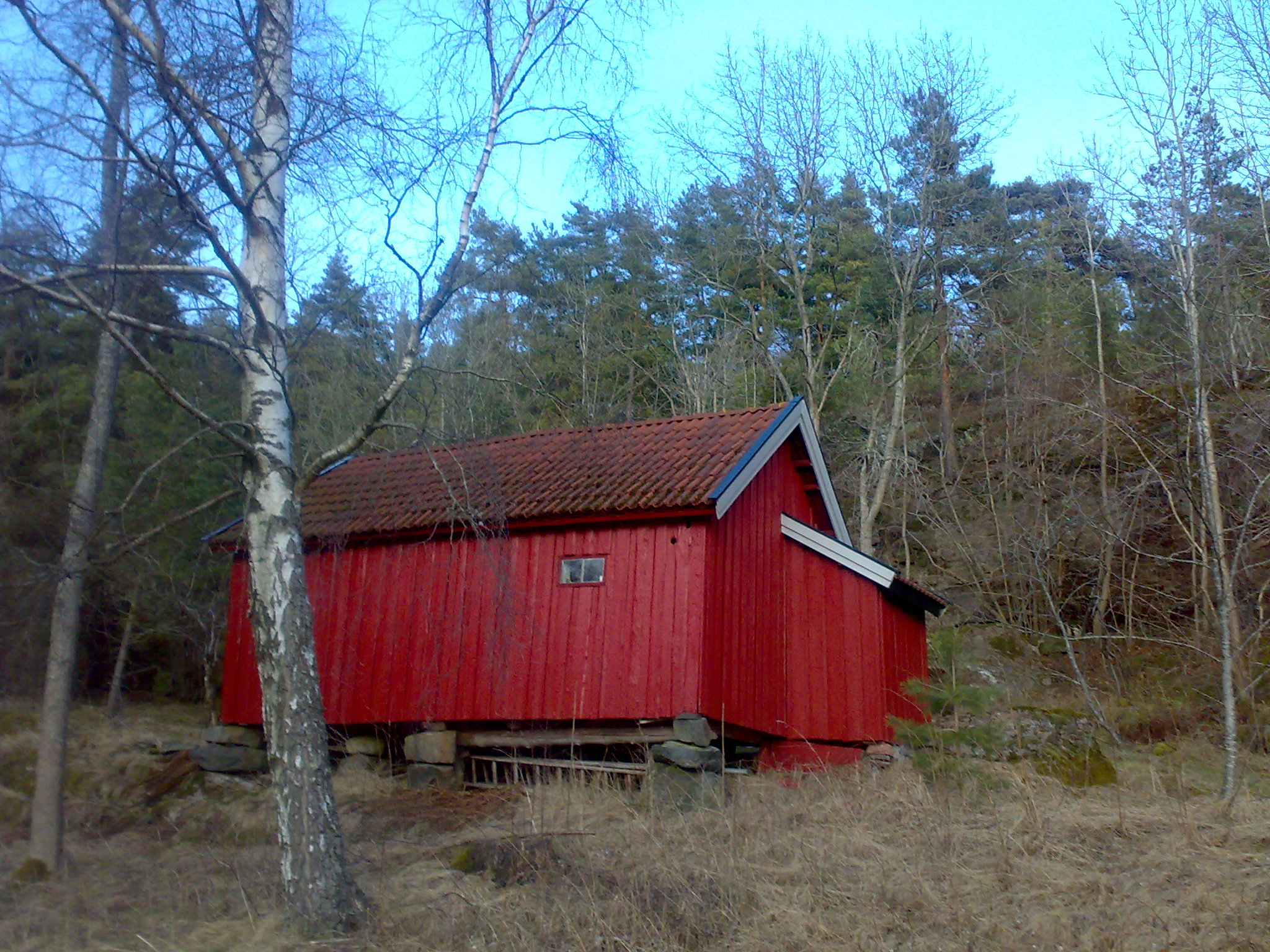 Ersvika, Hurum, Norway